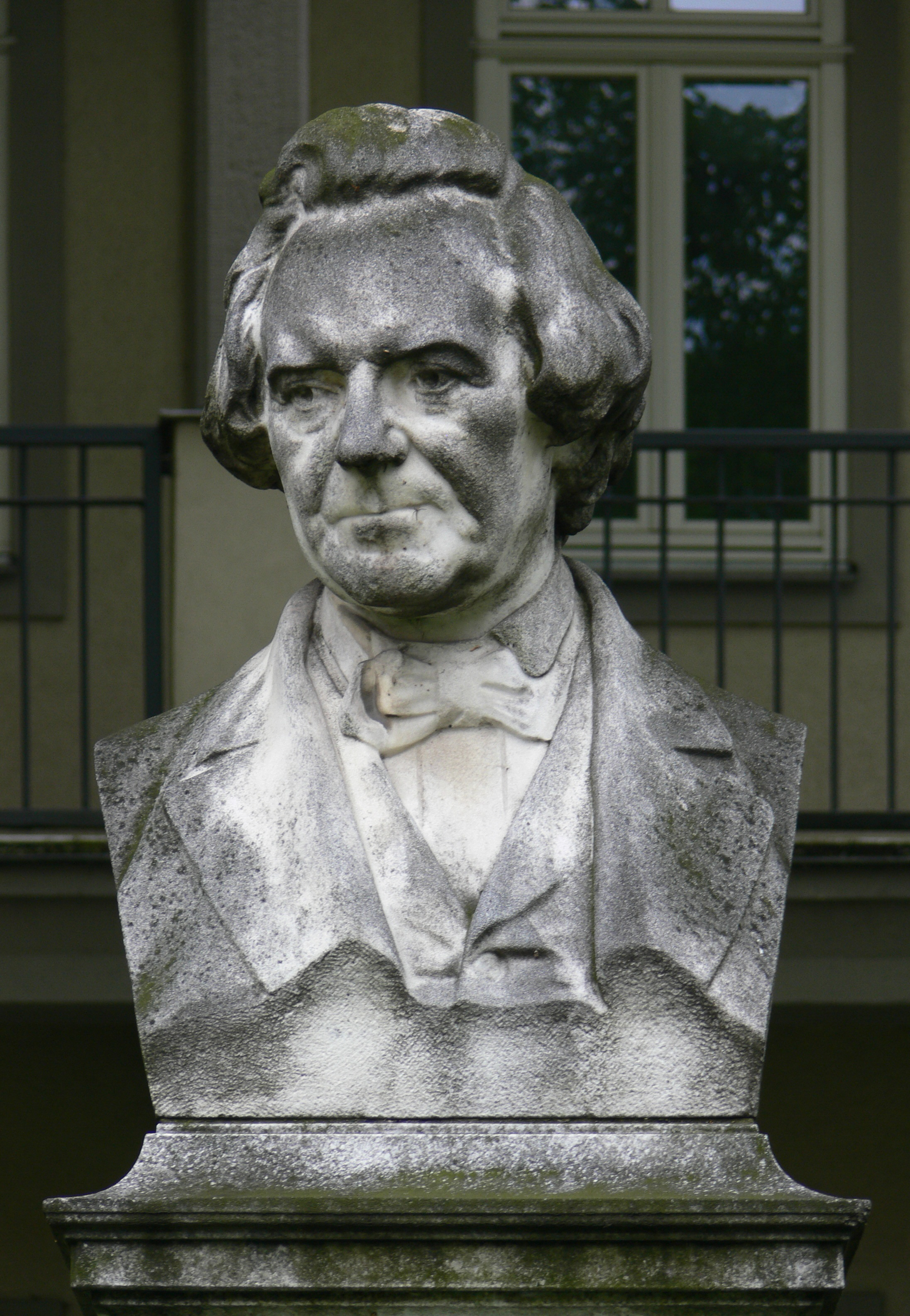 Jena: Denkmal für Karl Hase am Fürstengraben, Bildhauer: Carl Seffner